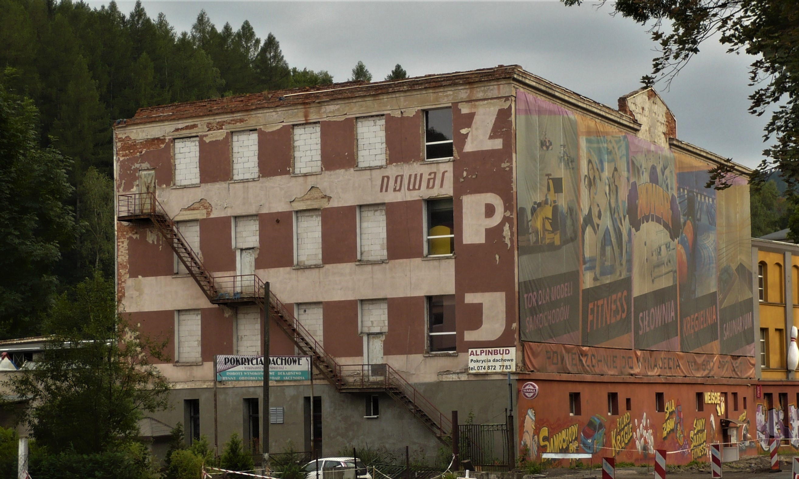 Nowa Ruda.Nowar